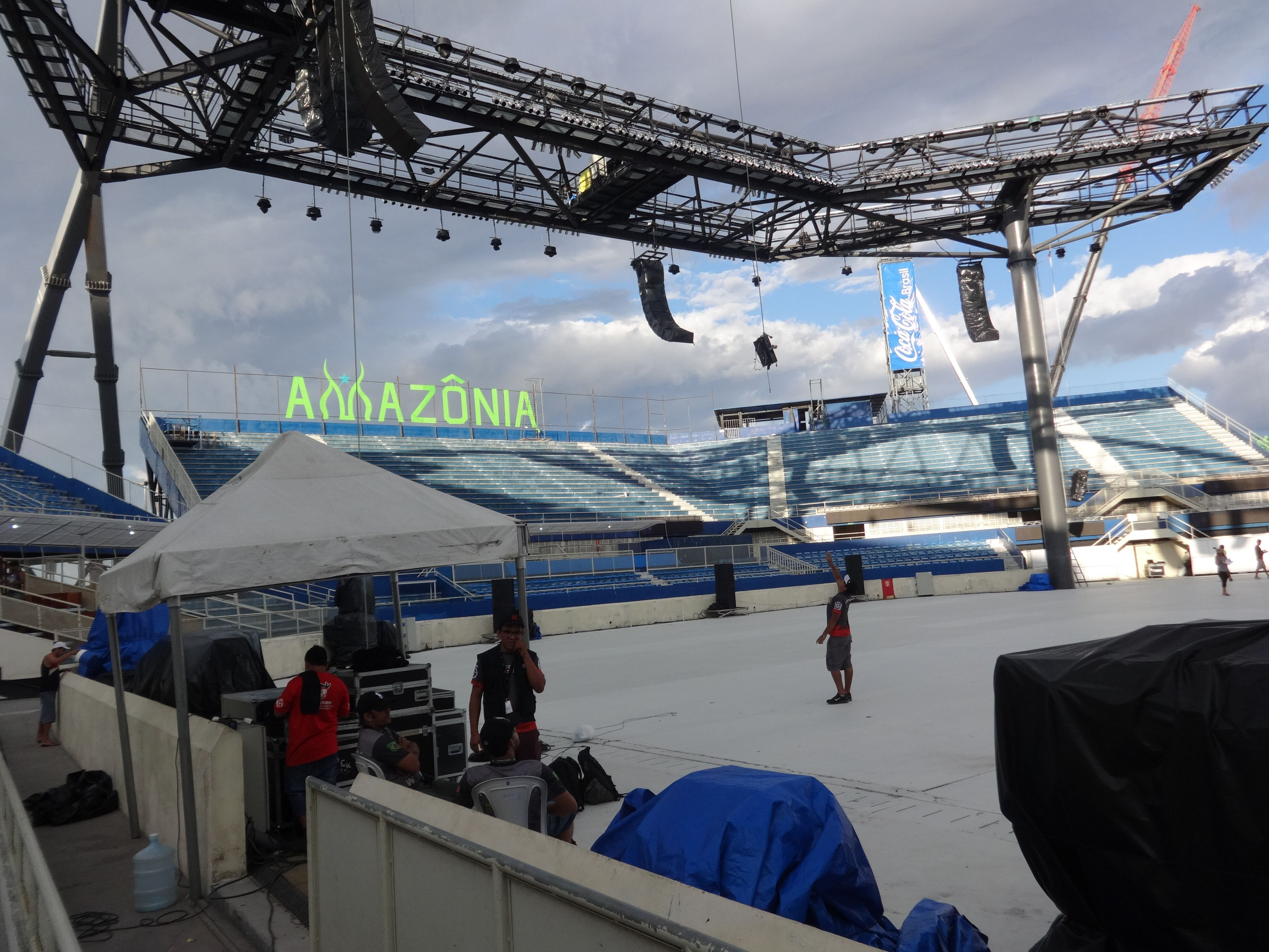 Trabalhadores fazem os últimos ajustes no Bumbódromo para o 50º Festival Folclórico de Parintins.